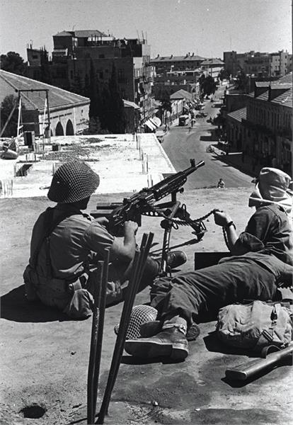 ירושלים - אמצעי בטחון בירושלים